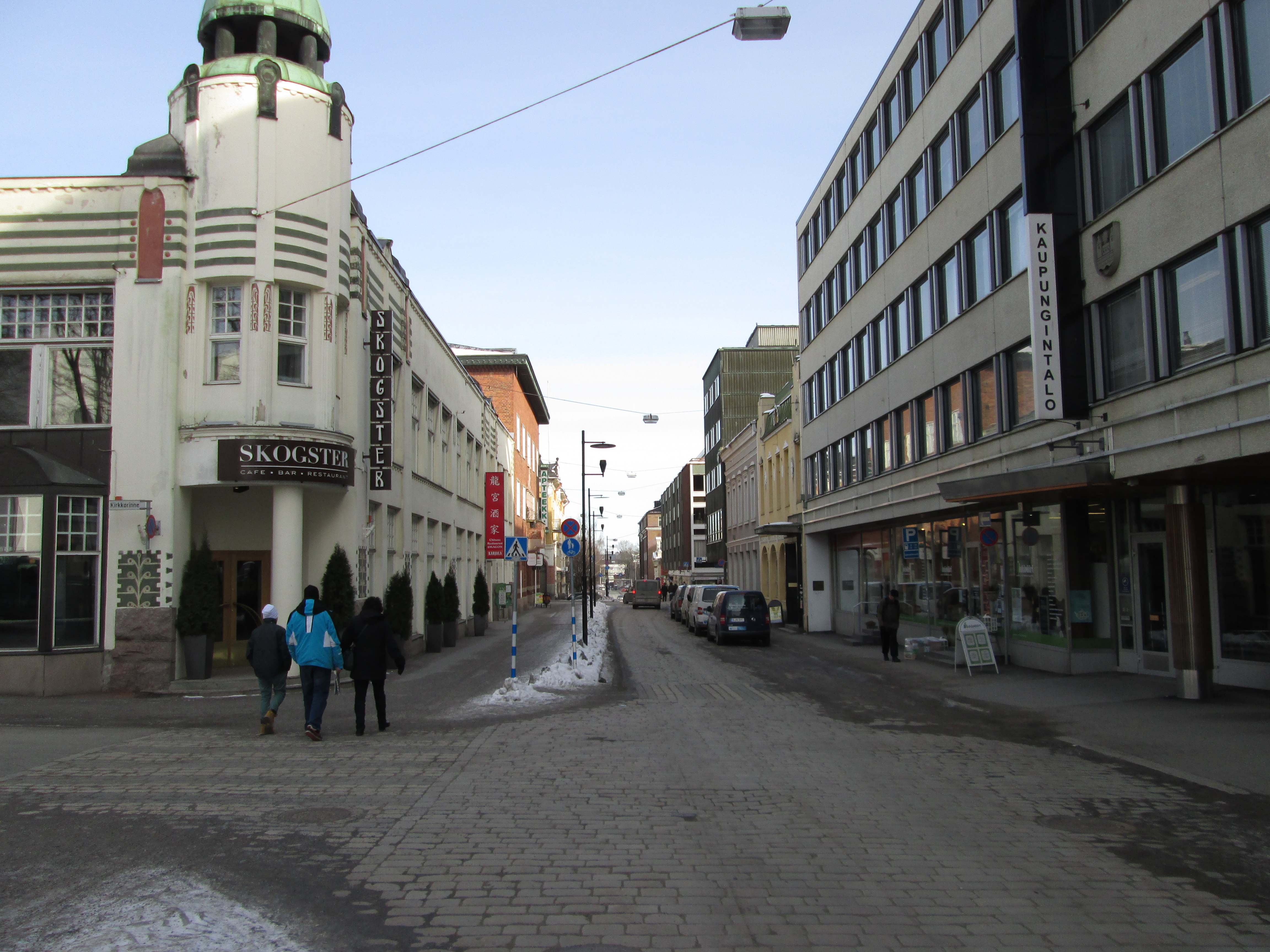 Raatihuoneenkatu kaupungintalon kohdalla